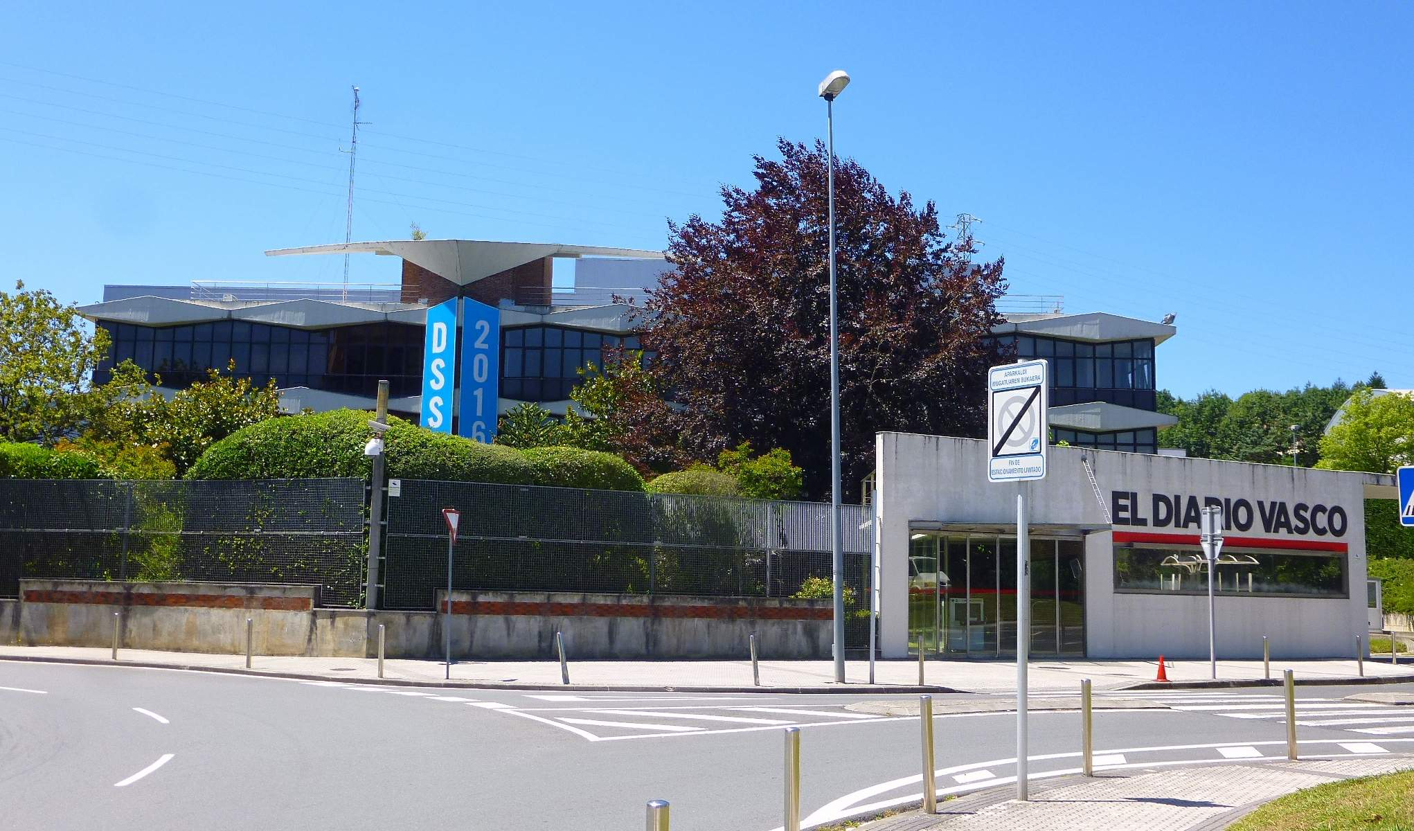 San Sebastián - Oficinas de El Diario Vasco